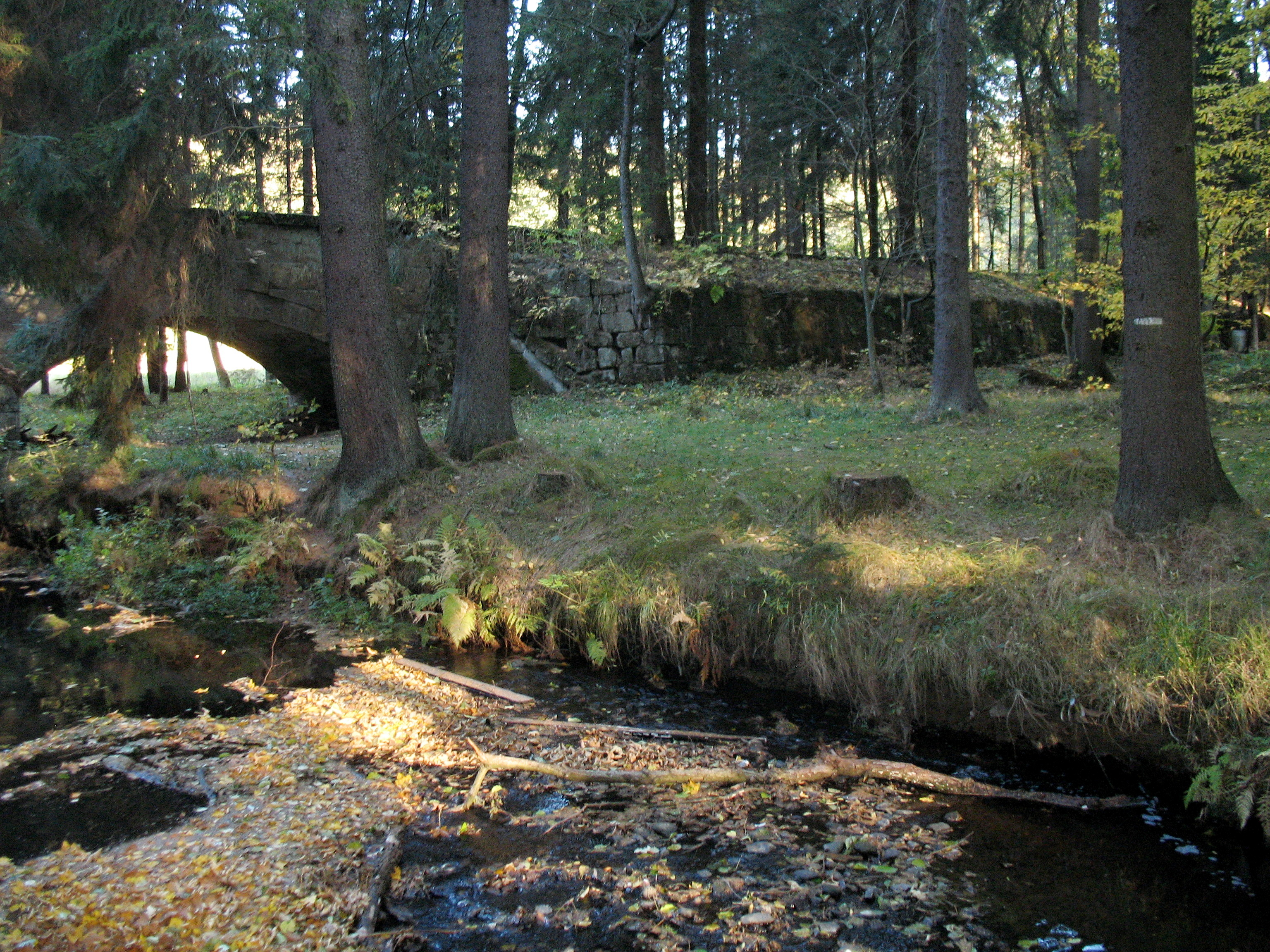 Akvadukt z 19. století v lokalitě Na Potocích v Dolní Chřibské, okres Děčín. Technická památka